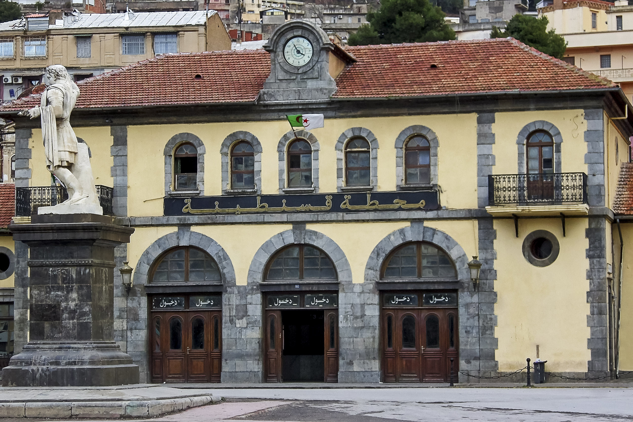 Gare de Constantine محطة القطار بقسنطينة Wilaya de Constantine ولاية قسنطينة